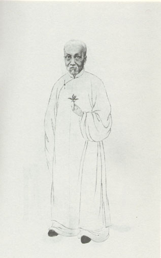 李慈銘，清朝學者。Li Ciming